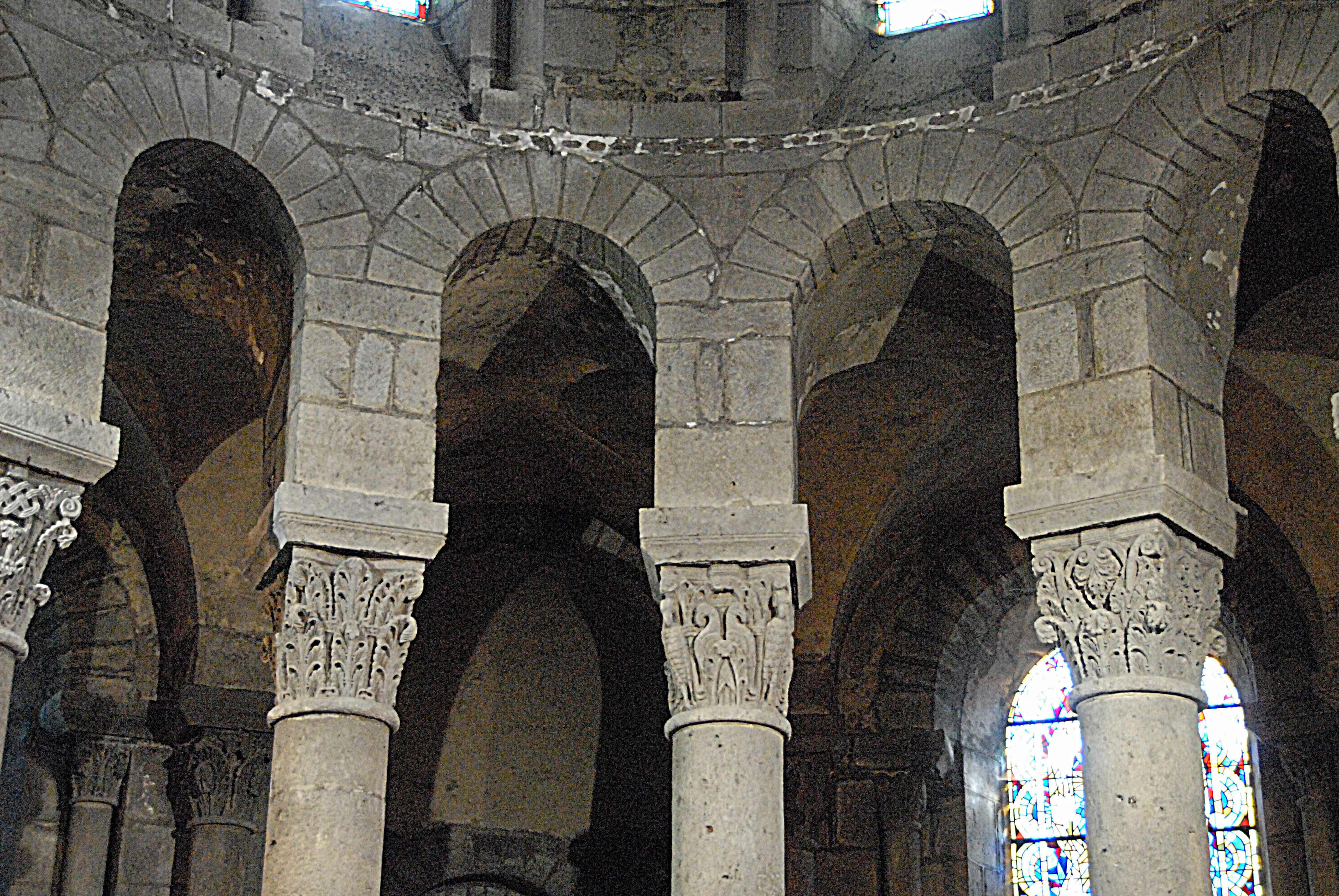 N.-D. d'Orcival, gestelzte Arkadenbögen der Chorapsis